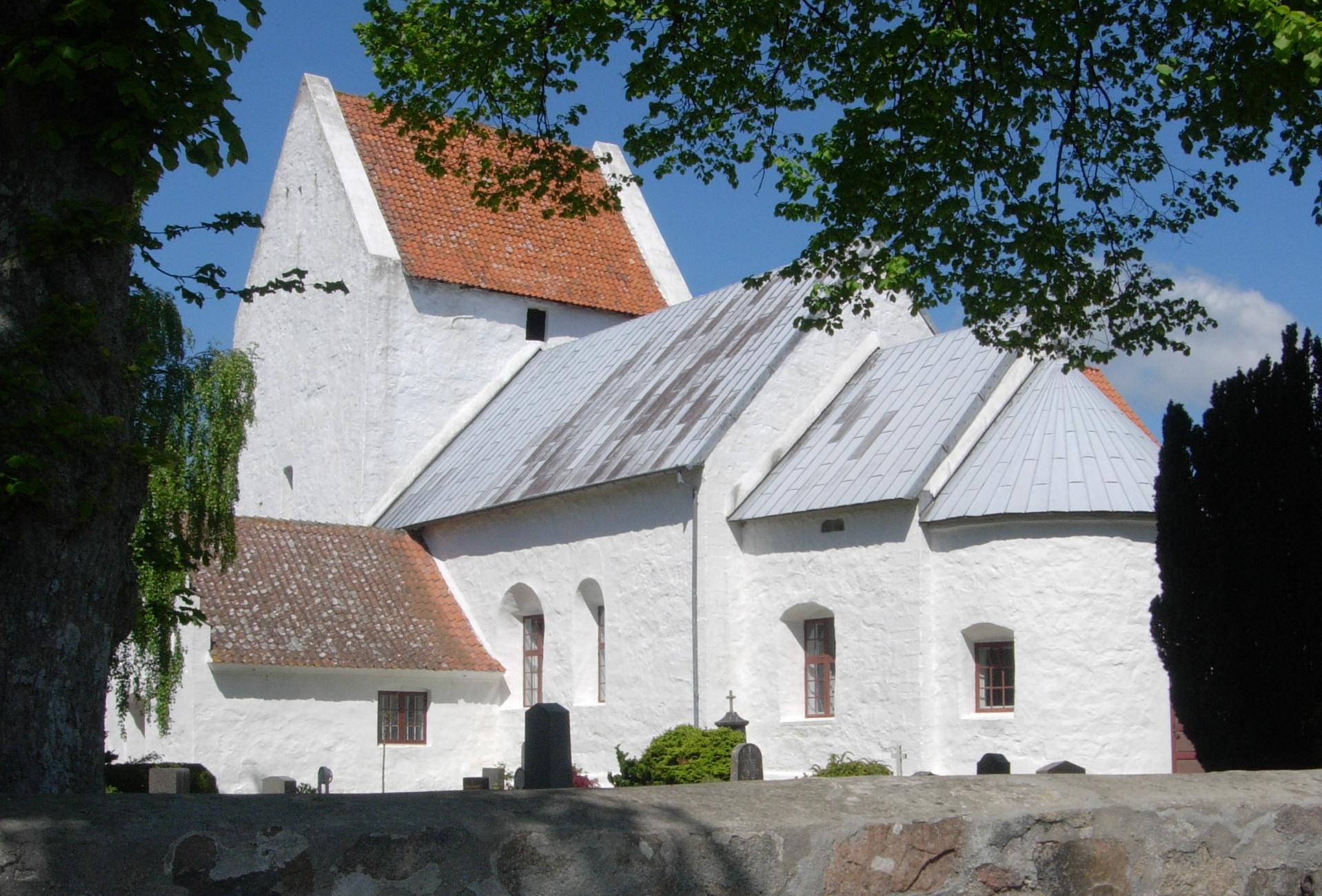 Sankt Ibs Kirke, Bornholm, Denmark.